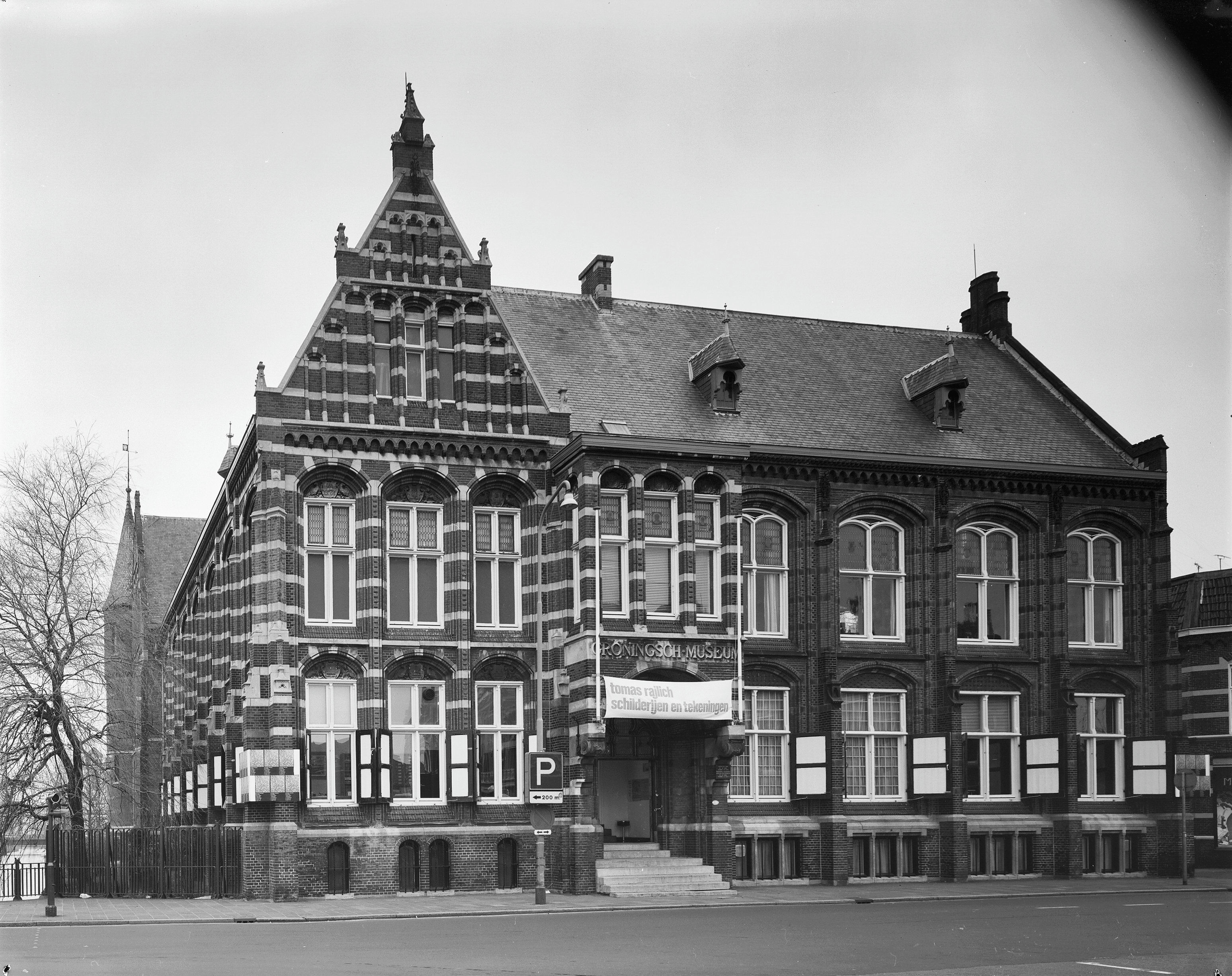 Museum: voorgevel